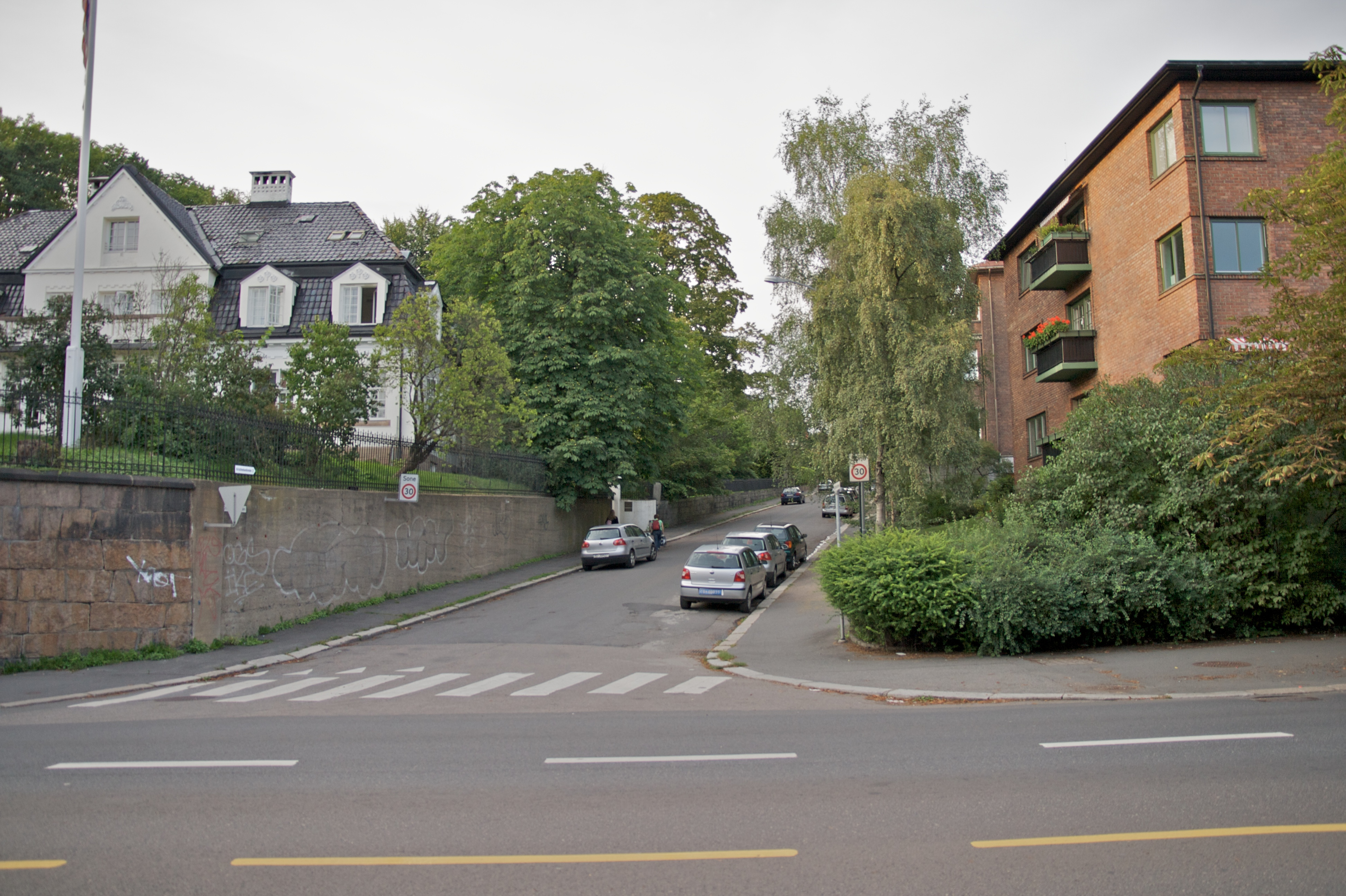 Kristinelundveien, Frogner i Oslo. Sett fra krysset mot Bygdøy allé.